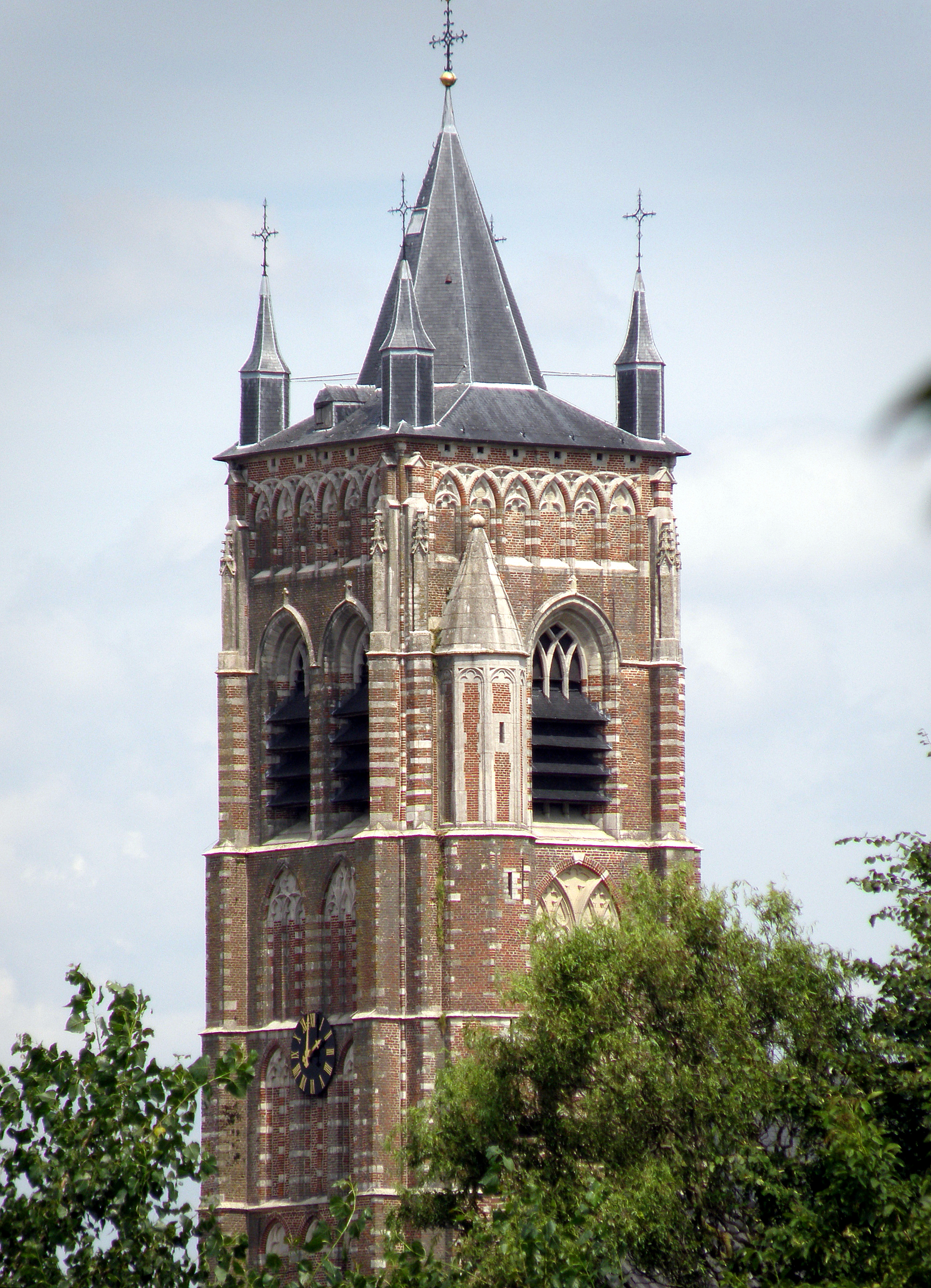 Sint-Lenaarts, deelgem. van Brecht (provincie Antwerpen, België). Sint-Leonarduskerk.